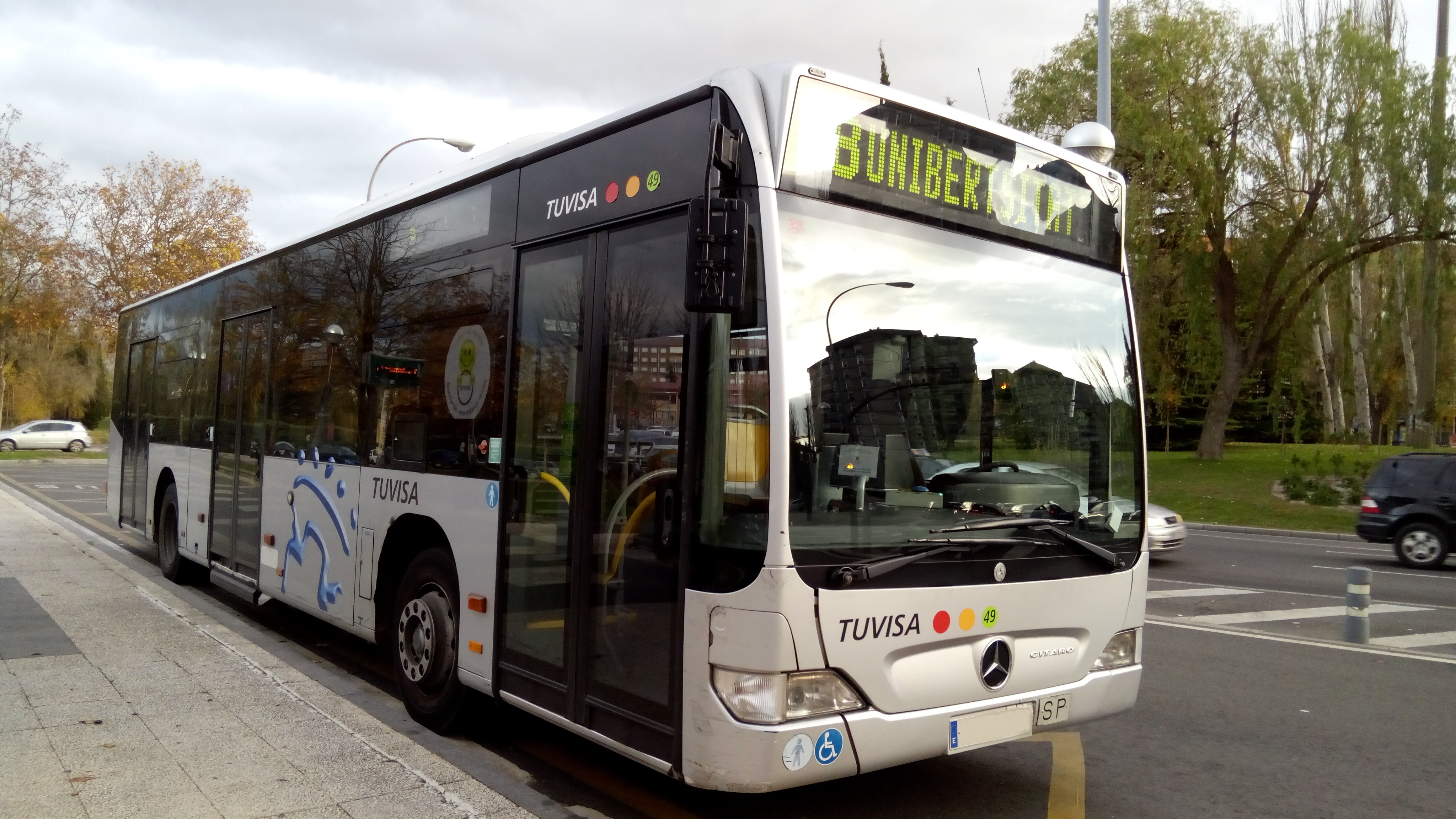 Tuvisa Unibertsitatea